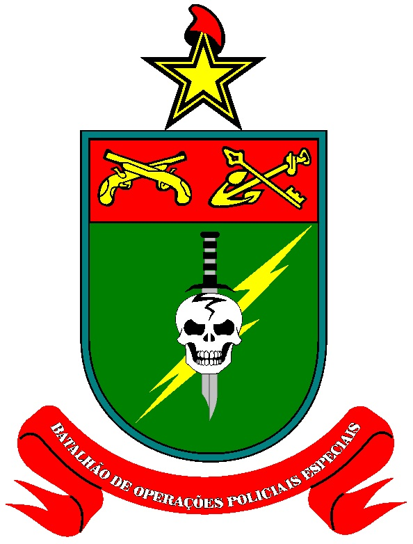 Novo brasão do Batalhão de Operações Policiais Especiais de Santa Catarina (Sem o Choque, separado)